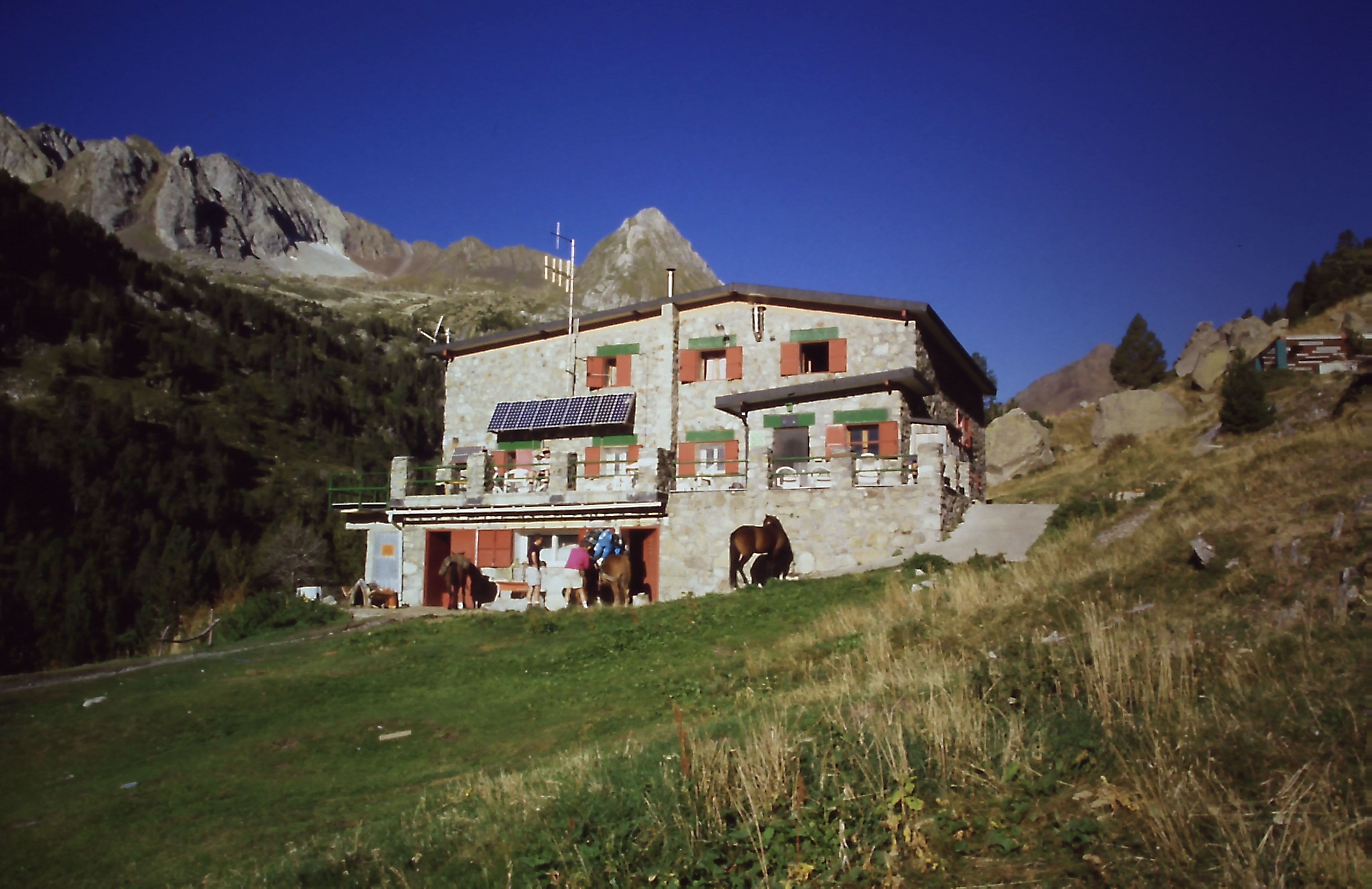 Refugi d'Estós, Benasc